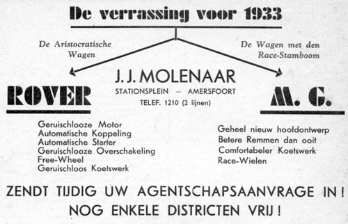 Rover (GB) - J.J. Molenaar, Amersfoort advertentie januari 1933